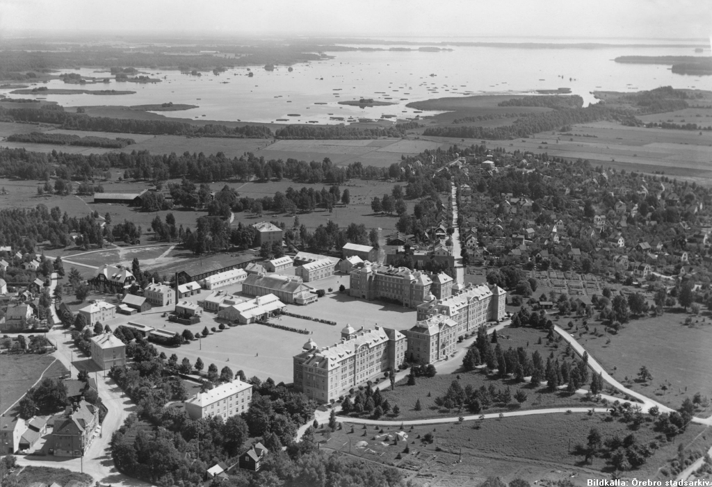 Flygfoto över Livregementets grenadjärer, Örebro